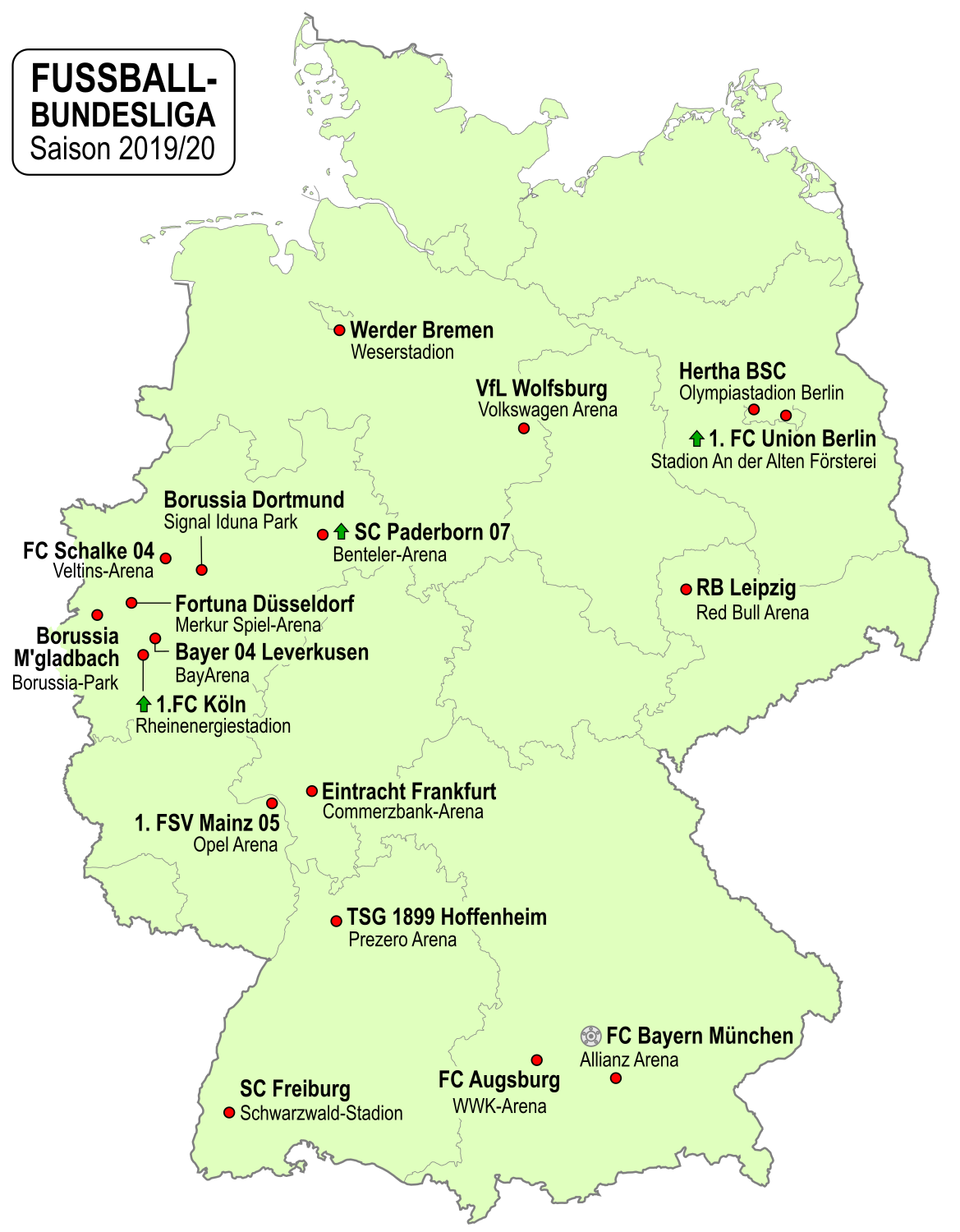 Karte der Vereine der Fußball-Bundesliga-Saison 2019/2020